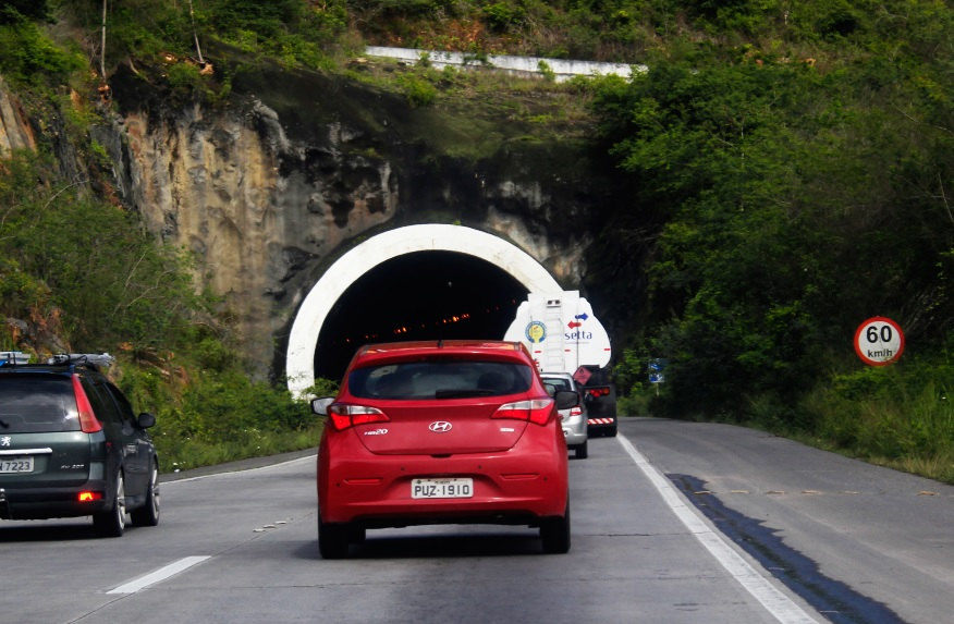 Túnel Cascavel na BR-232 a 6 km da cidade de Gravatá - Pernambuco.